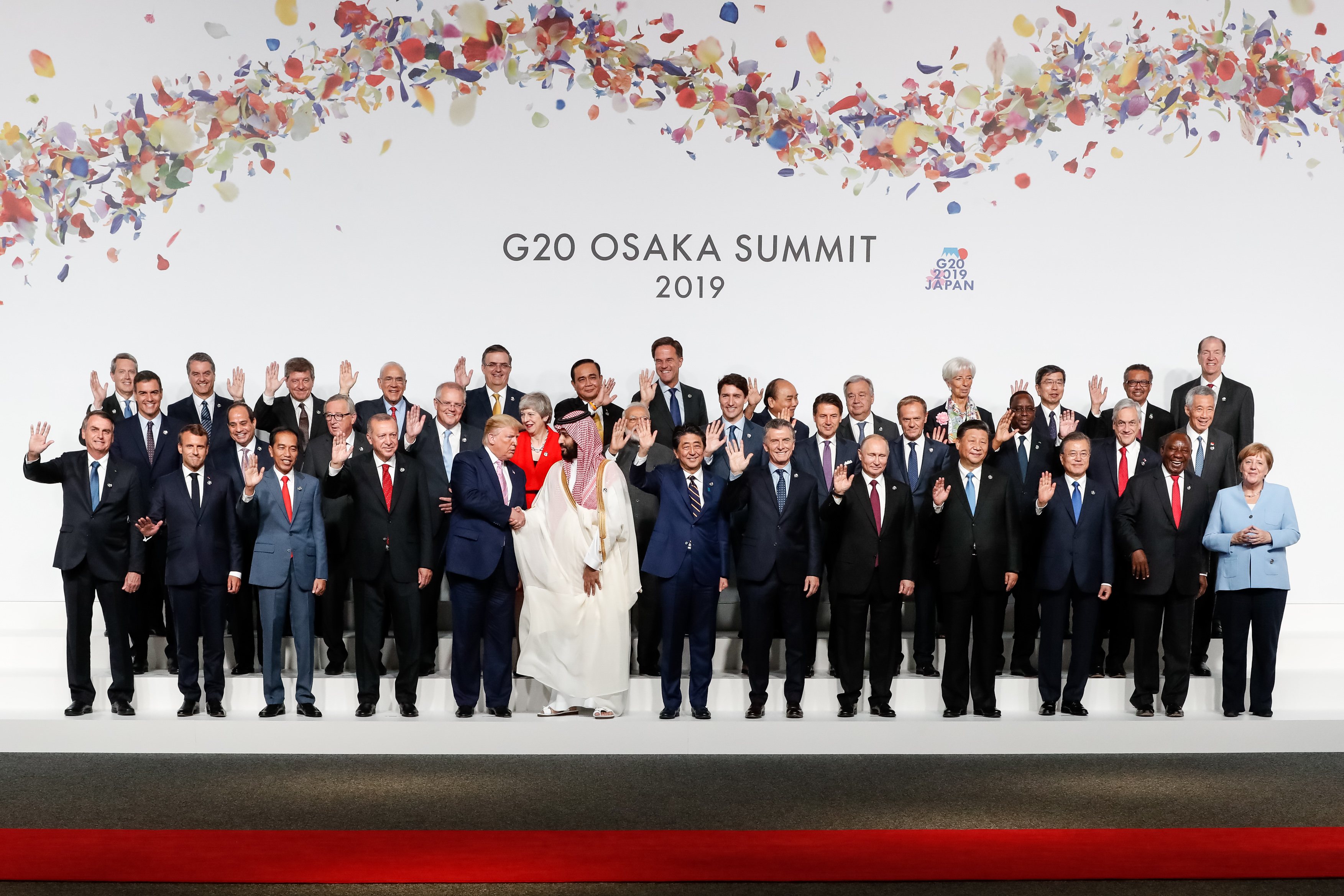 (Osaka - Japão, 28/06/2019) Presidente da República, Jair Bolsonaro, durante foto de família dos Líderes do G20.Foto: Alan Santos / PR